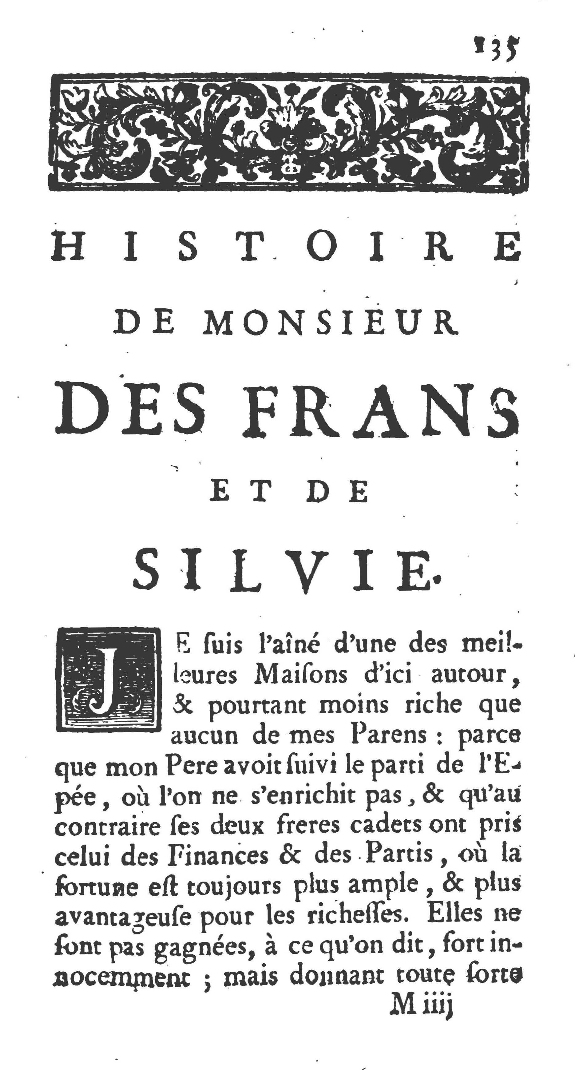 Titelblatt der „Histoire de Monsieur Des Frans et de Silvie“ in Robert Challes „Les illustres Françoises. Histoire véritable“.